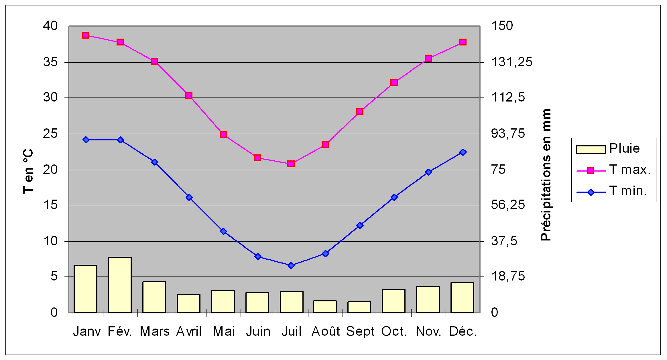 Diagramme climatique de la ville de Birdsville (Australie), comprenant deux courbes, représentant les températures maximales et minimales, et un histogramme, représentant la pluviométrie, pour les douze mois de l'année.